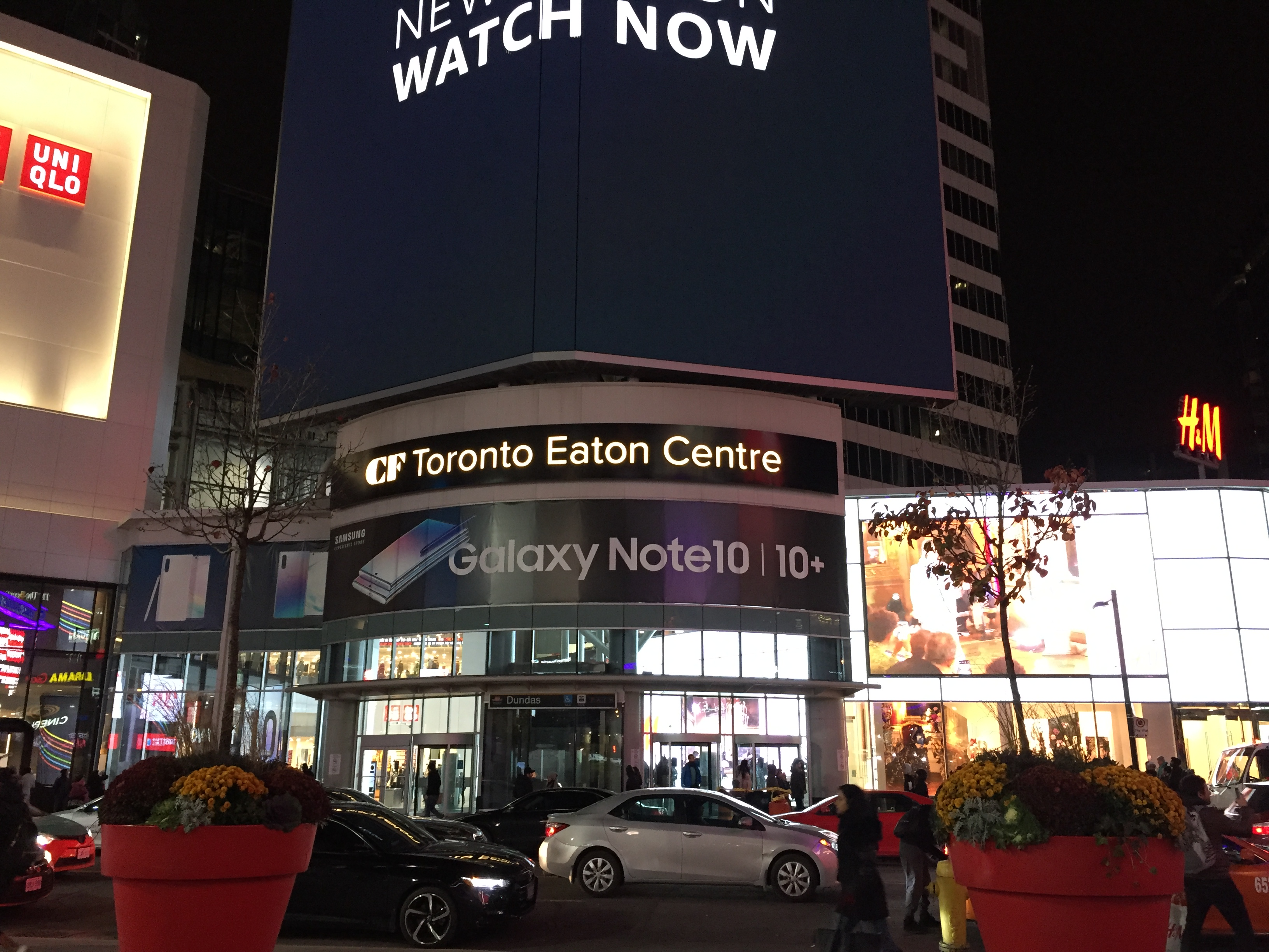 کوردی: شاباژێری ئیتن سەنتەر لە تۆرەنتۆ